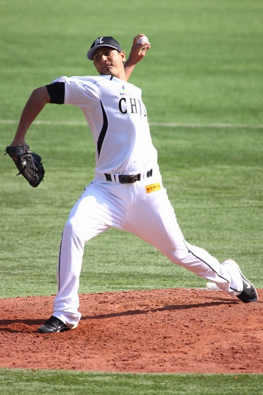 2013年在籍 日本プロ野球 千葉ロッテマリーンズ ウィル・レデズマ投手